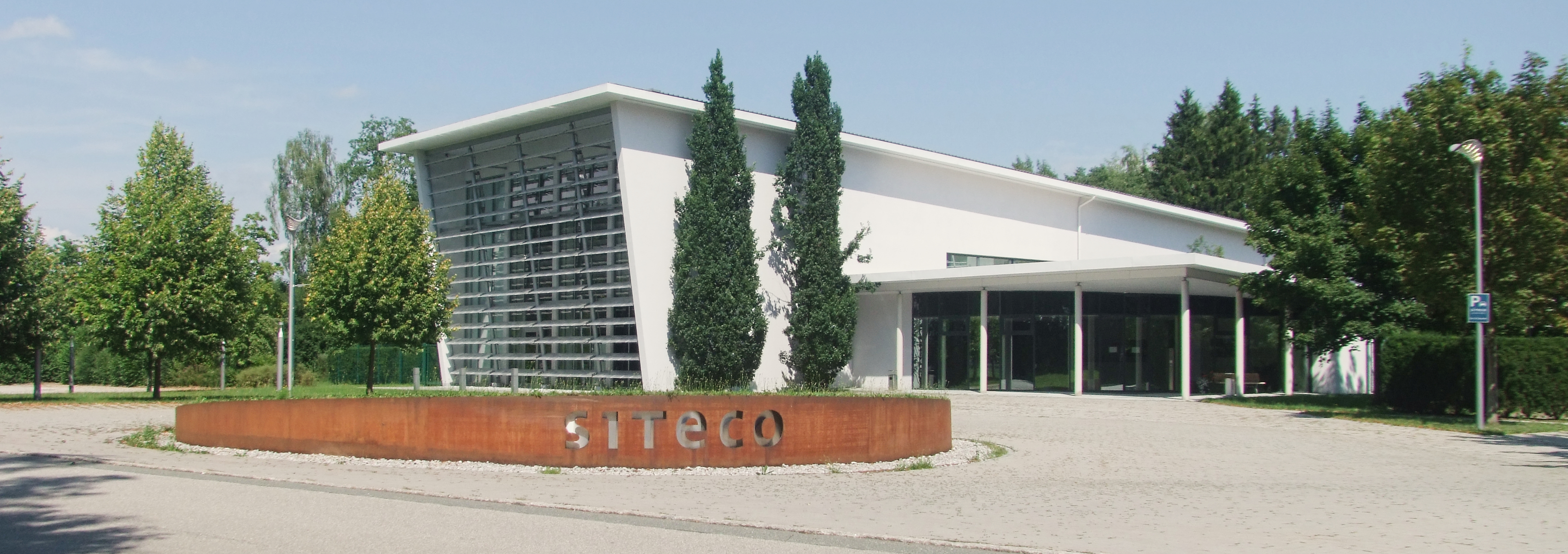 Eingangsbereich Siteco Beleuchtungstechnik GmbH in Traunreut, rechts Empfang, links Ausstellunghalle.